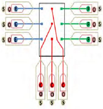 در دستگاه نشان داده شده در شکل 2 روبرو، هر کدام از داروهای ECF، در مخزنی جداگانه ذخیره شده اند. پس دوزشان می تواند بطور مستقل از هم کنترل شود.